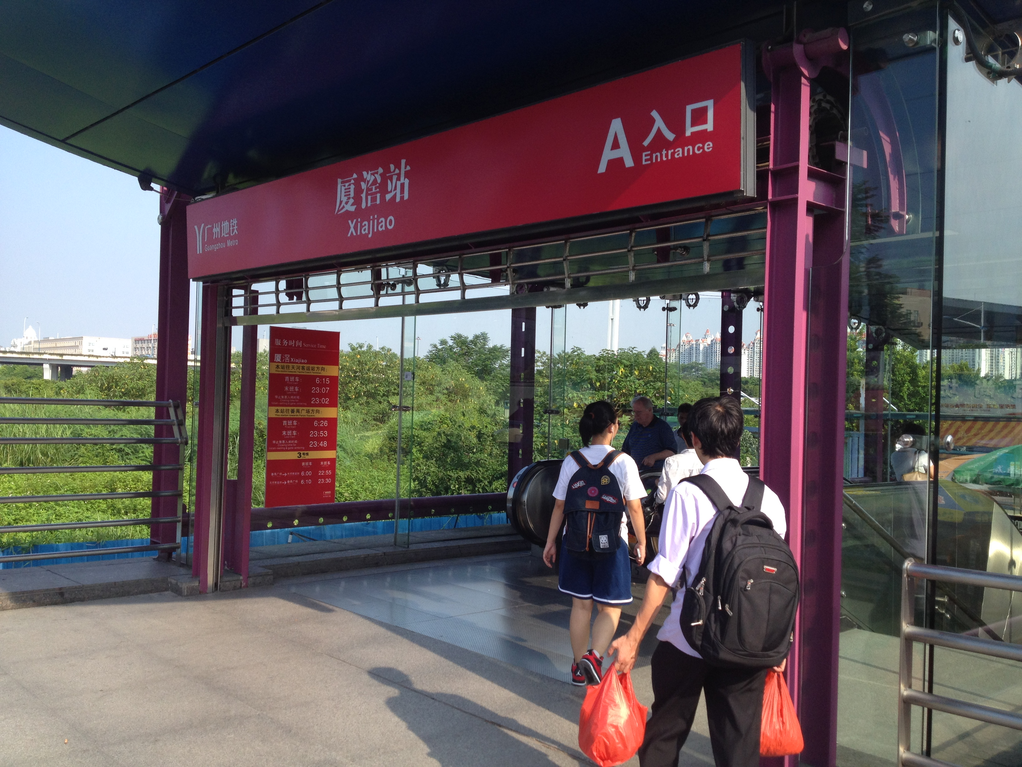 广州地铁厦滘站A出口